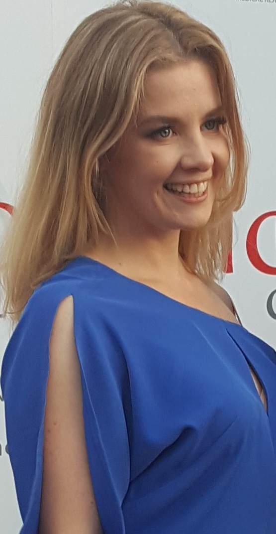 Polska aktorka Anna Powierza w czerwcu 2017 roku.